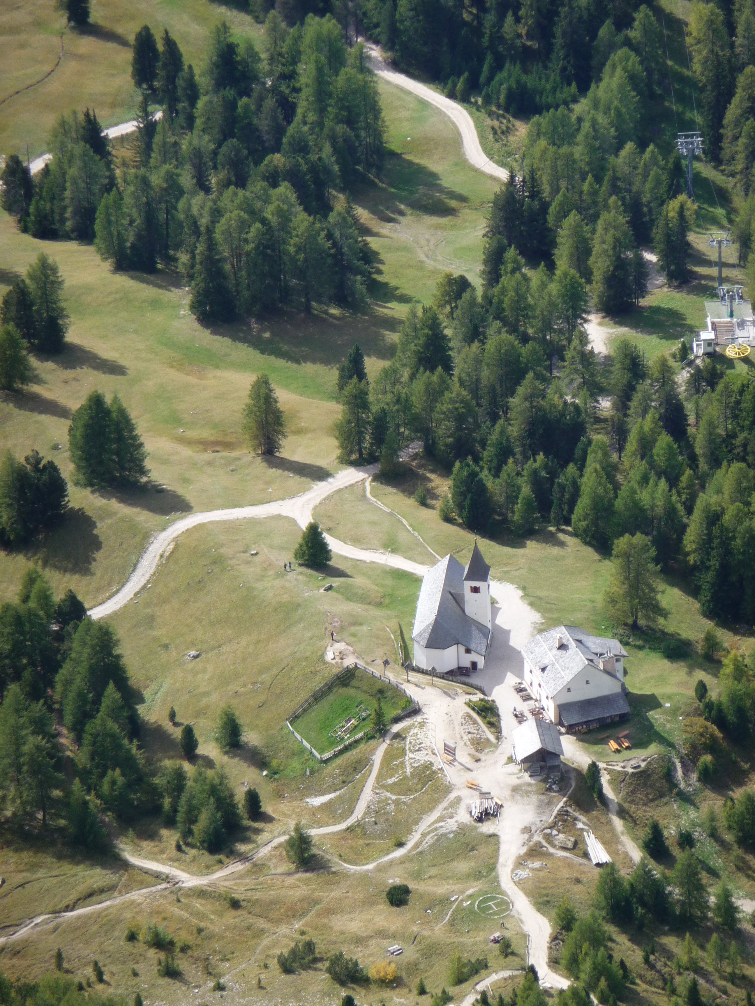 Heilig-Kreuz-Kirche und -Hospiz vom Heiligkreuz-Kofel aus gesehen